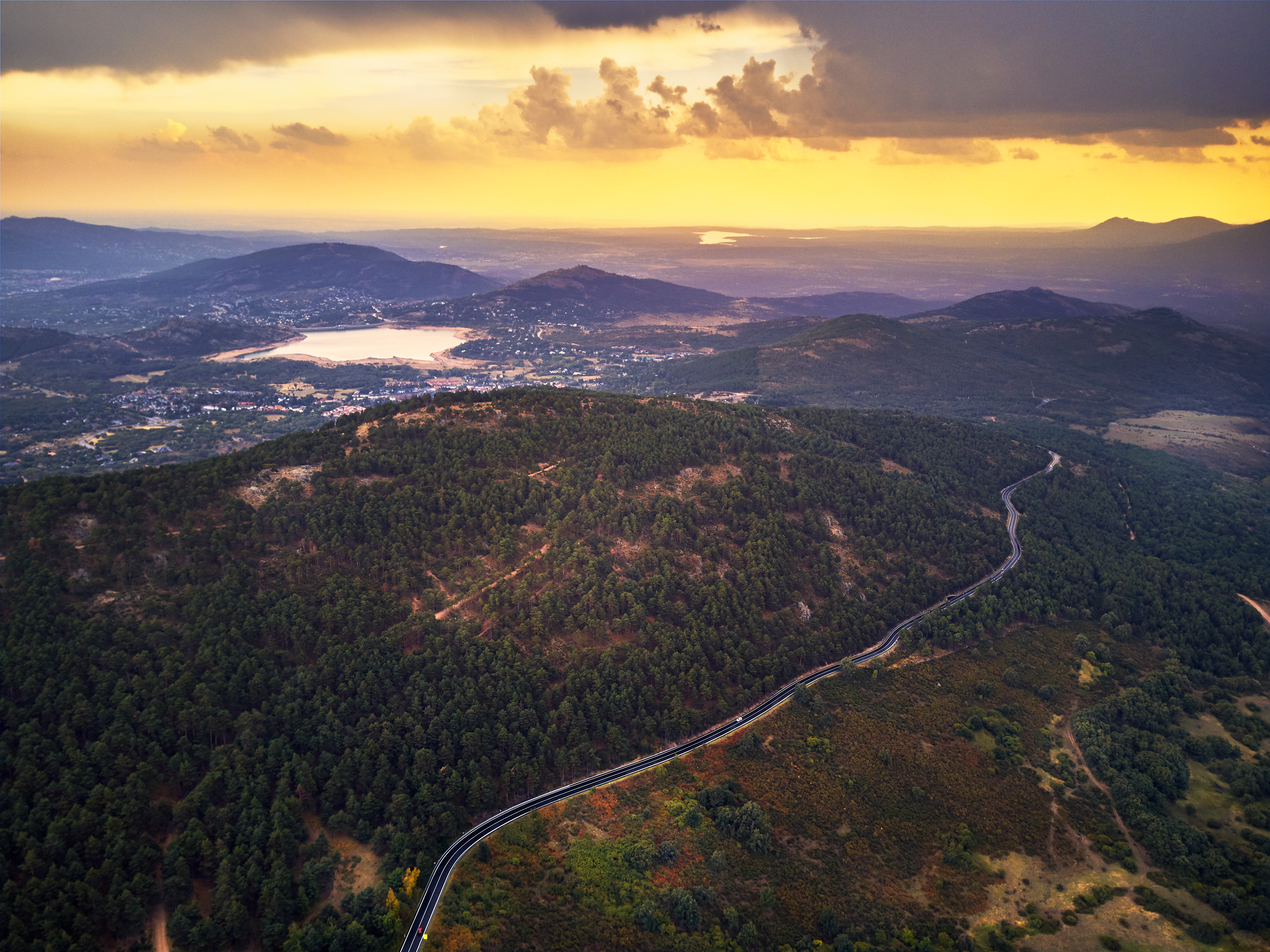 Navacerrada